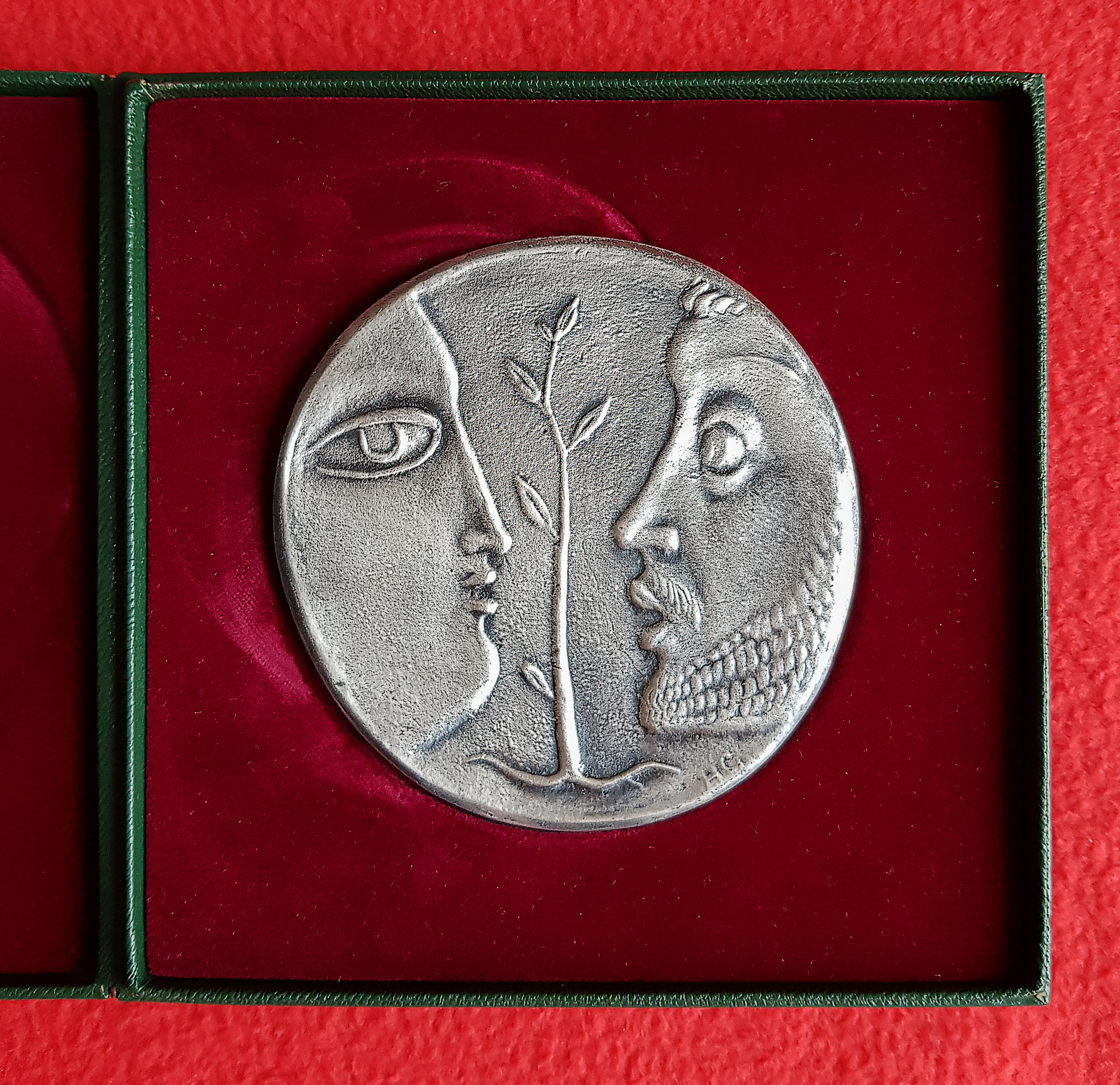 Die Silberne Verdienstplakette Darmstadt wurde mit einer Silbermünze und einer Urkunde verliehen. Hier: Plakette für Prof. Dr. Hans-Gerhard Evers, 1965, Vorderseite